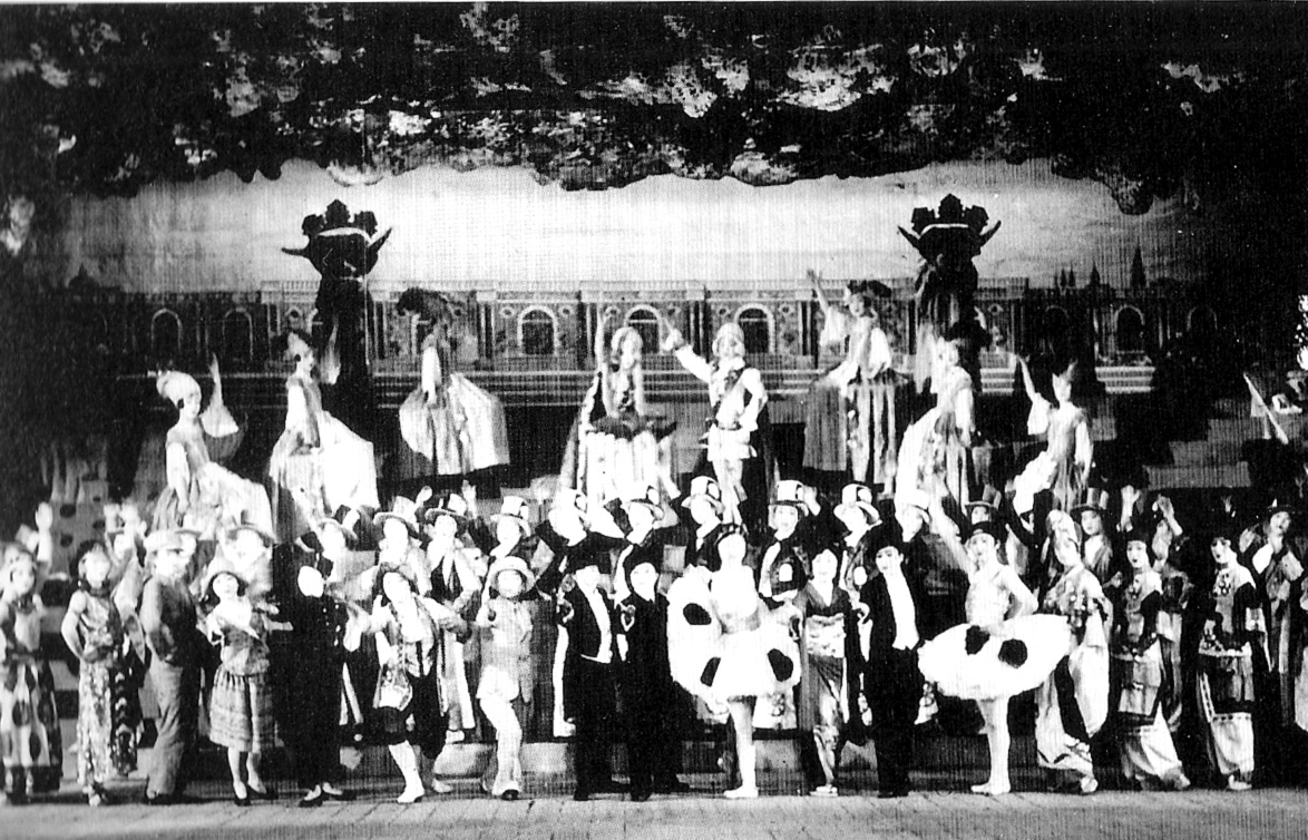 1928年「モン・パリ」再演のフィナーレ